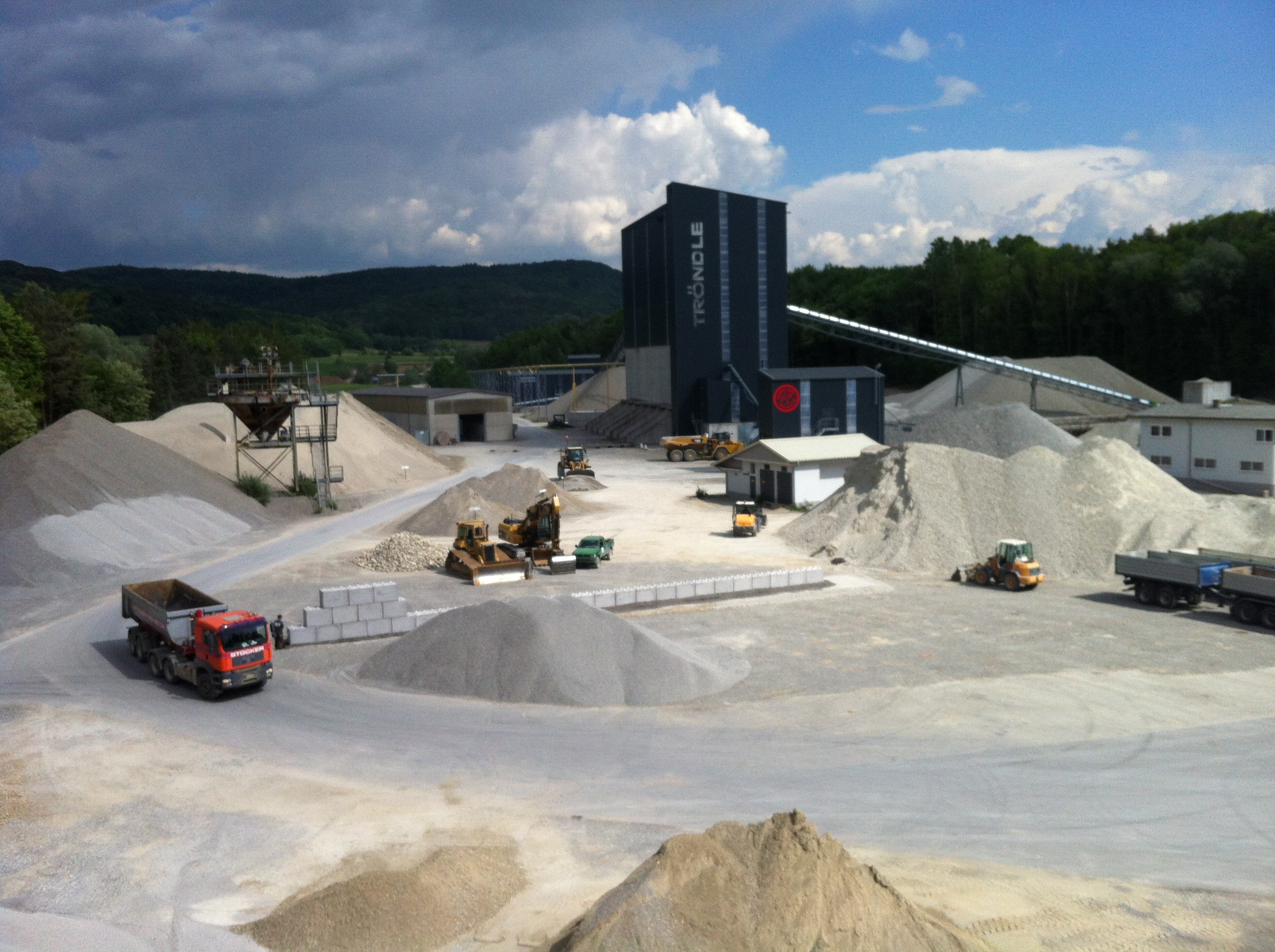 Küssaberg, Gemeinde im Landkreis Waldshut in Baden-Württemberg. Gemarkung Dangstetten: Bereich des Kieswerks der Fa. Tröndle bei Rheinheim. Lokalisierung des ehemaligen Römerlagers Dangstetten.